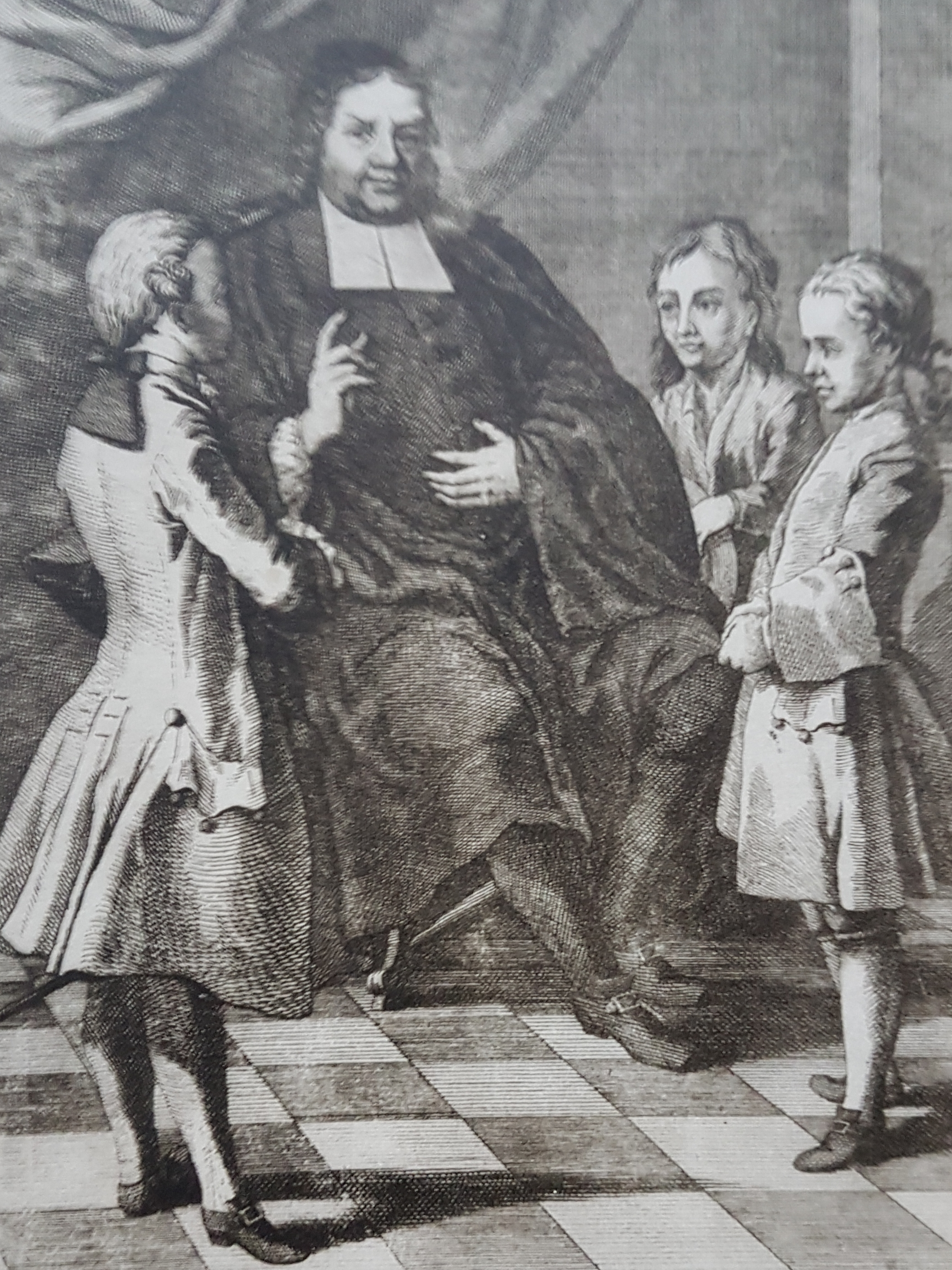 Eric Tolstadius avtecknad av Carl Erik Bergqvist , avfotograferad bild från Allhems Svenskt konstnärslexikon.